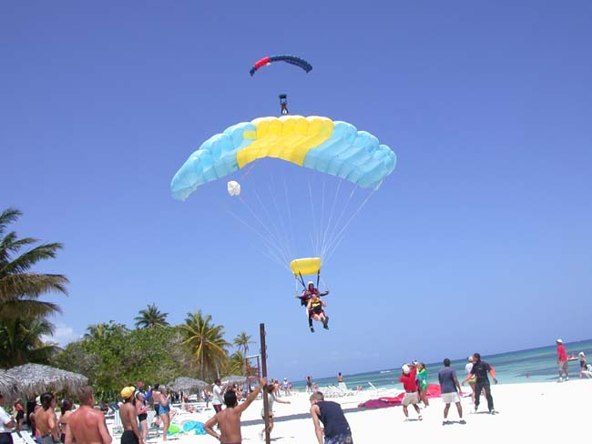 Tandem_Fallschirmsprung/Guardalavaca